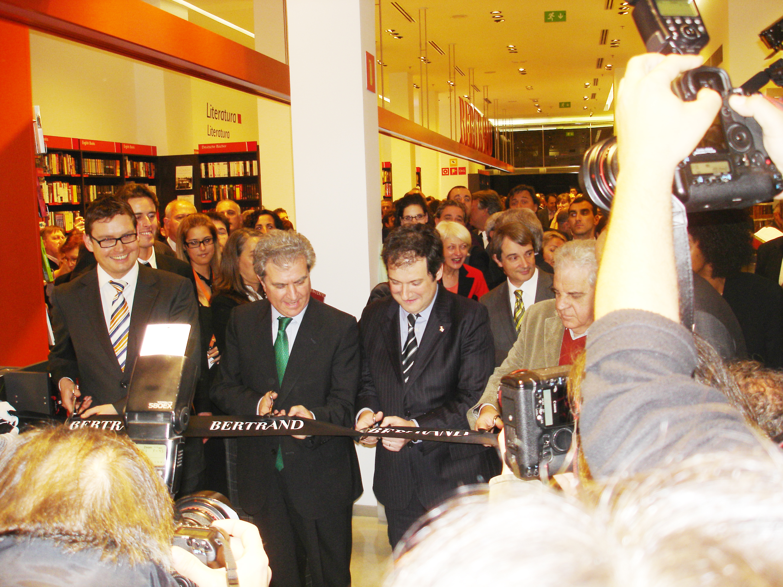 Inauguració de la llibreria Bertrand a Rambla Catalunya de Barcelona amb la presència de l'alcalde Jordi Hereu, el ministre de Cultura César Antonio Molina i l'escriptor Juan Marsé i el director gral llibreries Bertrand a Espanya Sven Huber. Març 2009.